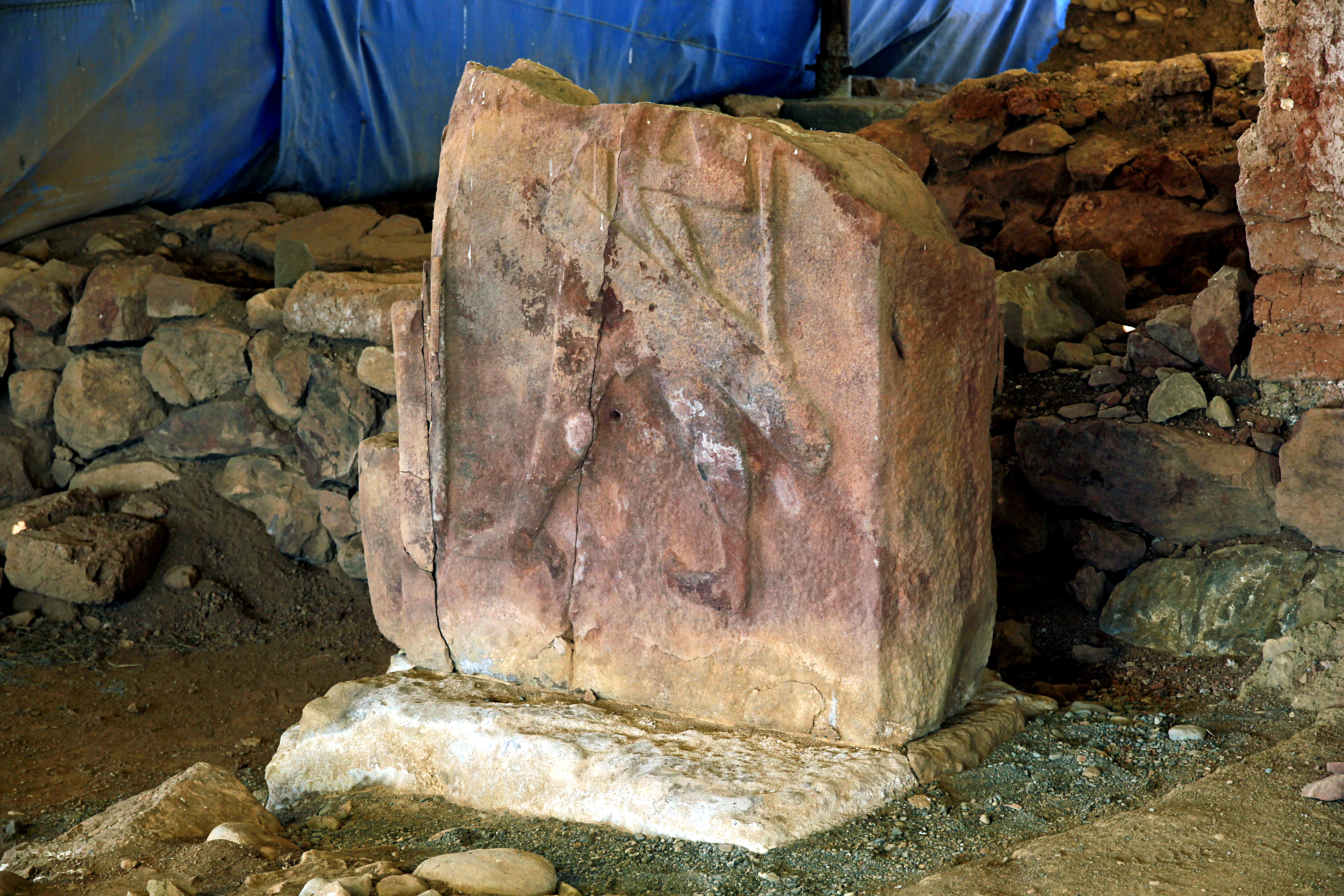 Šapinuwa/Ortaköy, hethitische Stadt bei Çorum, Zentraltürkei, Gebäude C, Krieger-Relief